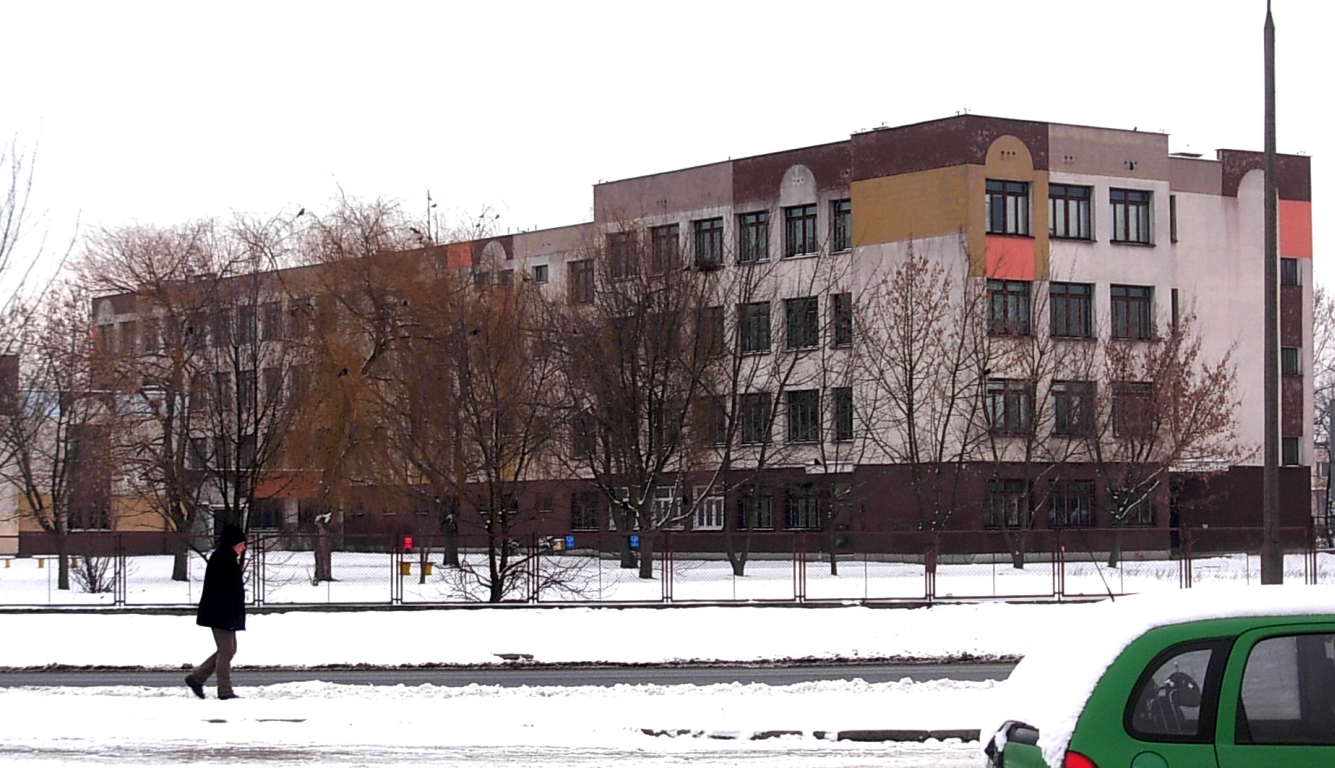 Szkoła podstawowa osiedlu Wyżyny w Bydgoszczy przy ul. Glinki